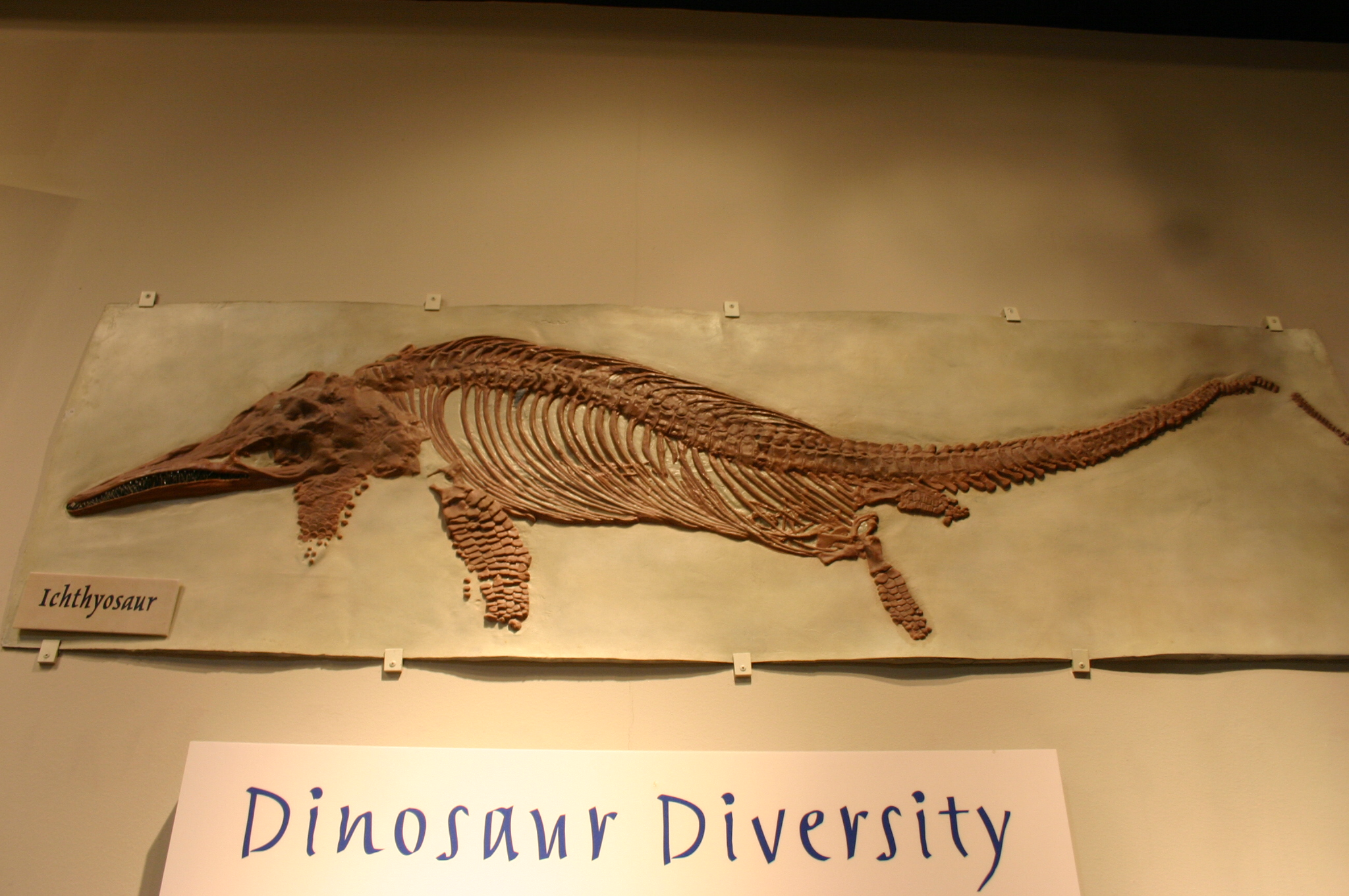 Ichthyosaur